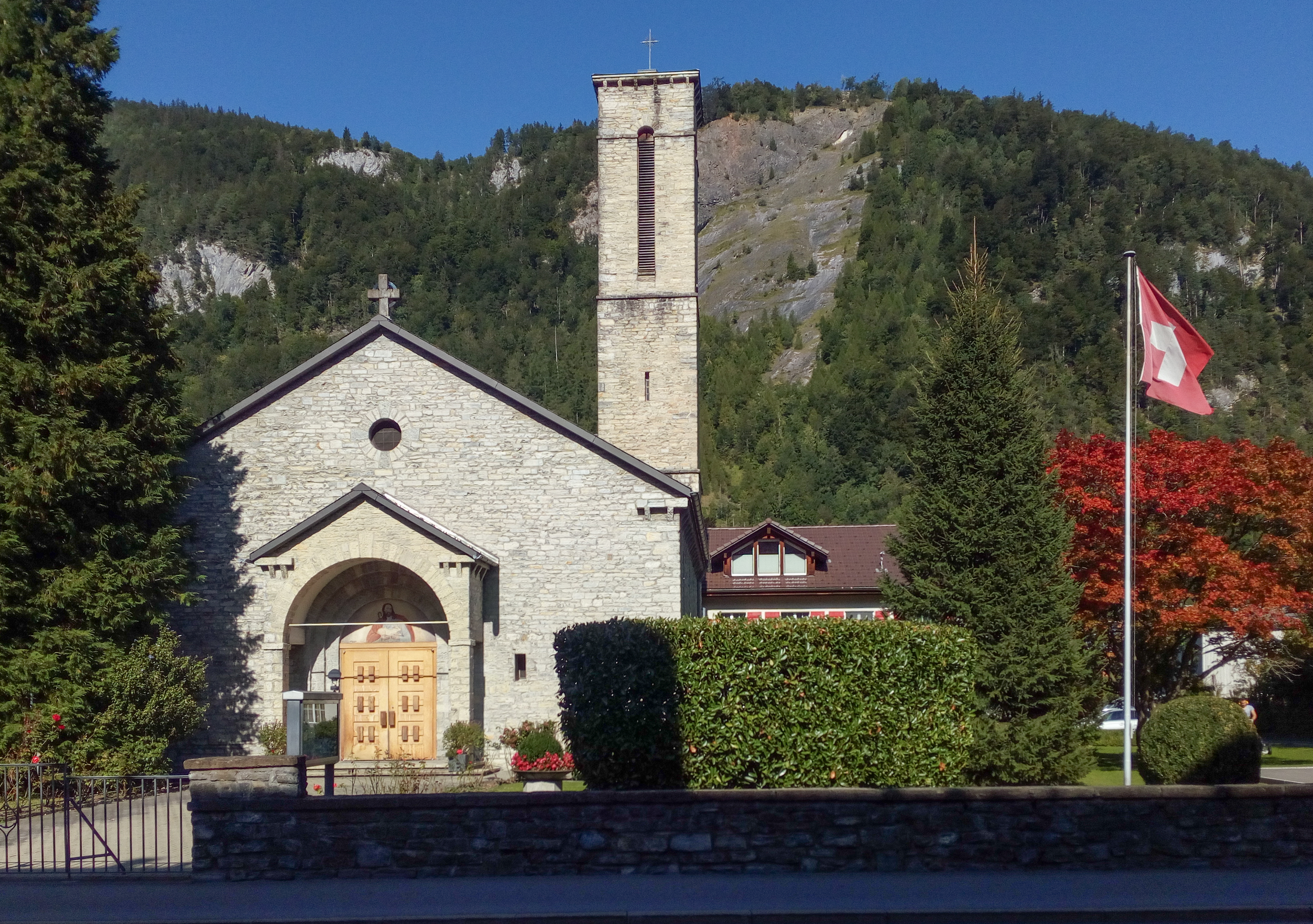 Römisch-katholische Guthirt-Kirche von Meiringen im Berner Oberland